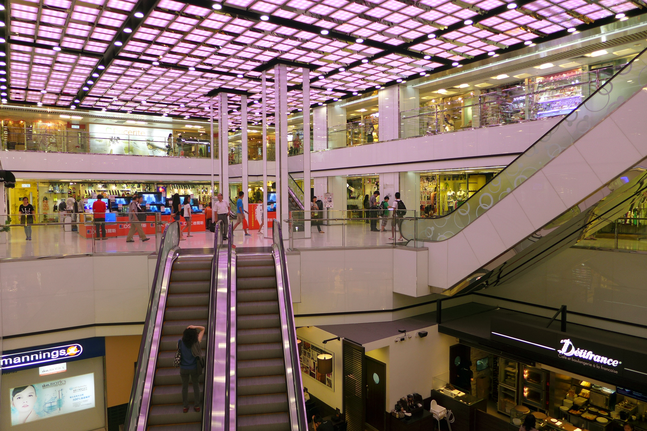 Amoy Plaza Main Void